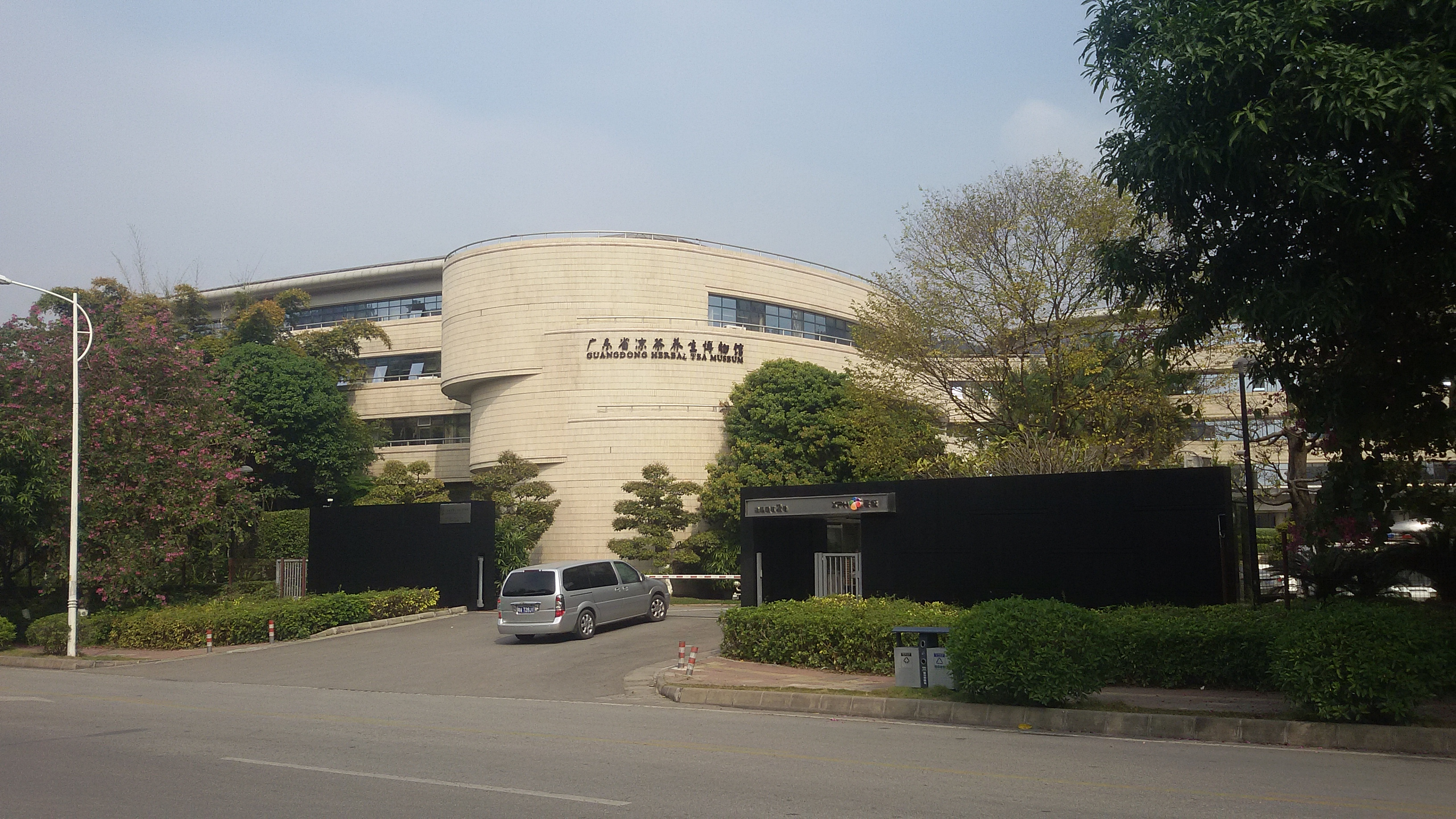 粵語: 廣東省涼茶養生博物館